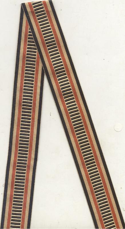 Kriegsehrenkreuz vom Ehrenbund deutscher Weltkriegsteilnehmer ist eine nichtstaatliche deutsche Weltkriegs-Gedenk-Auszeichnung, aus der Zeit der Weimarer Republik; hier: Separataufnahme vom zugehörigen Trageband des Ehrenzeichens.